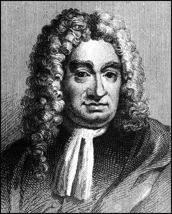 sujet: Daniel Defoe licence